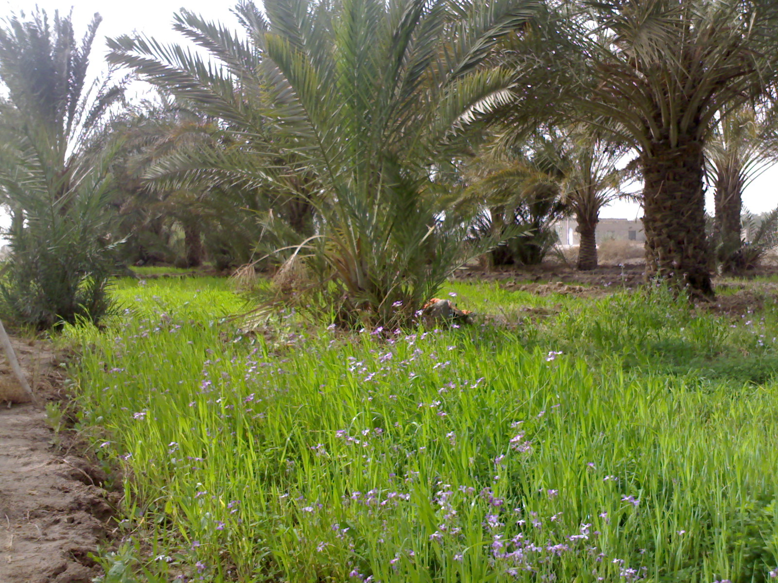 صورة لبستان من بساتين النحيل في بلدة القرنة التابعة لمحافظة البصرة